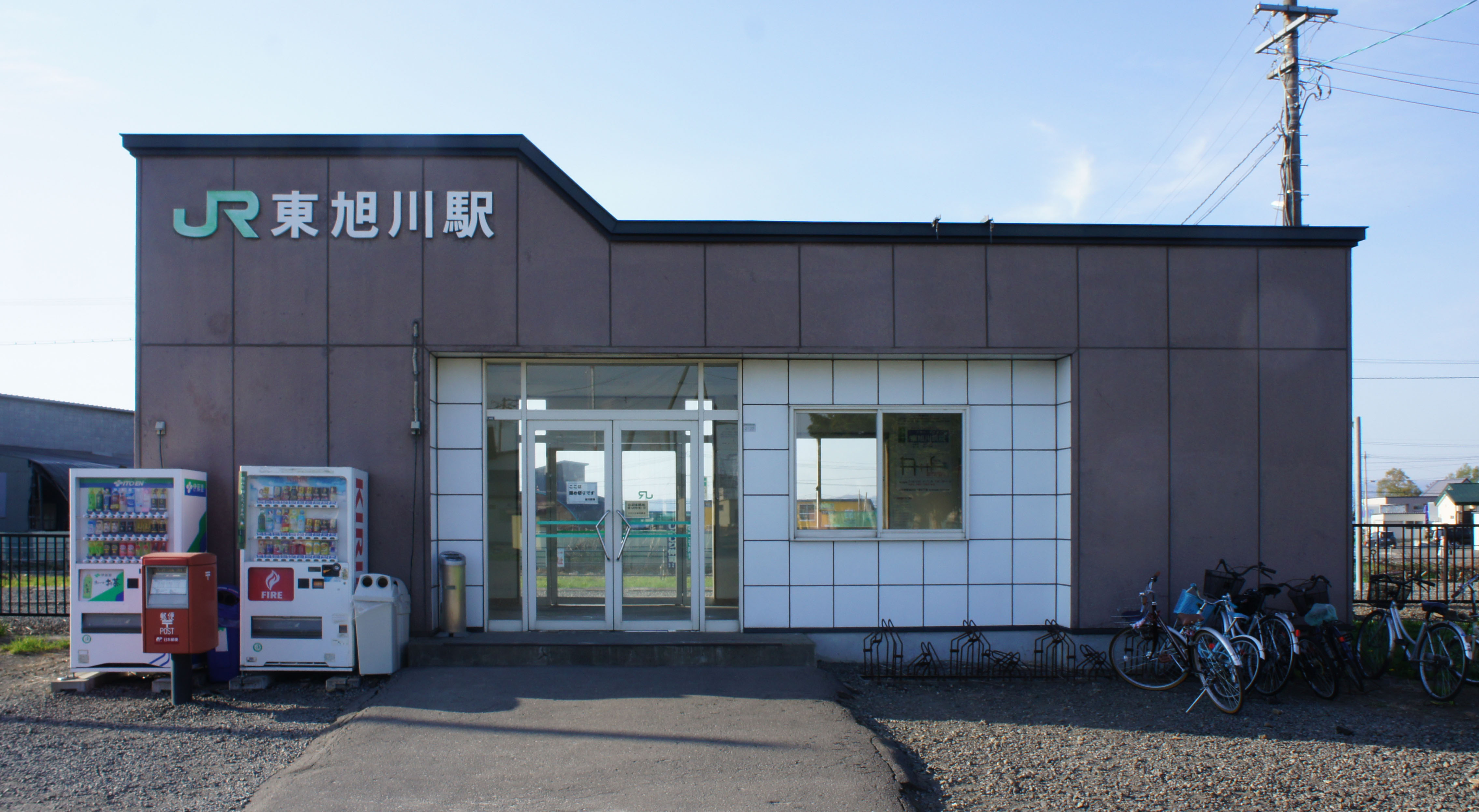 JR石北本線・東旭川駅の駅舎